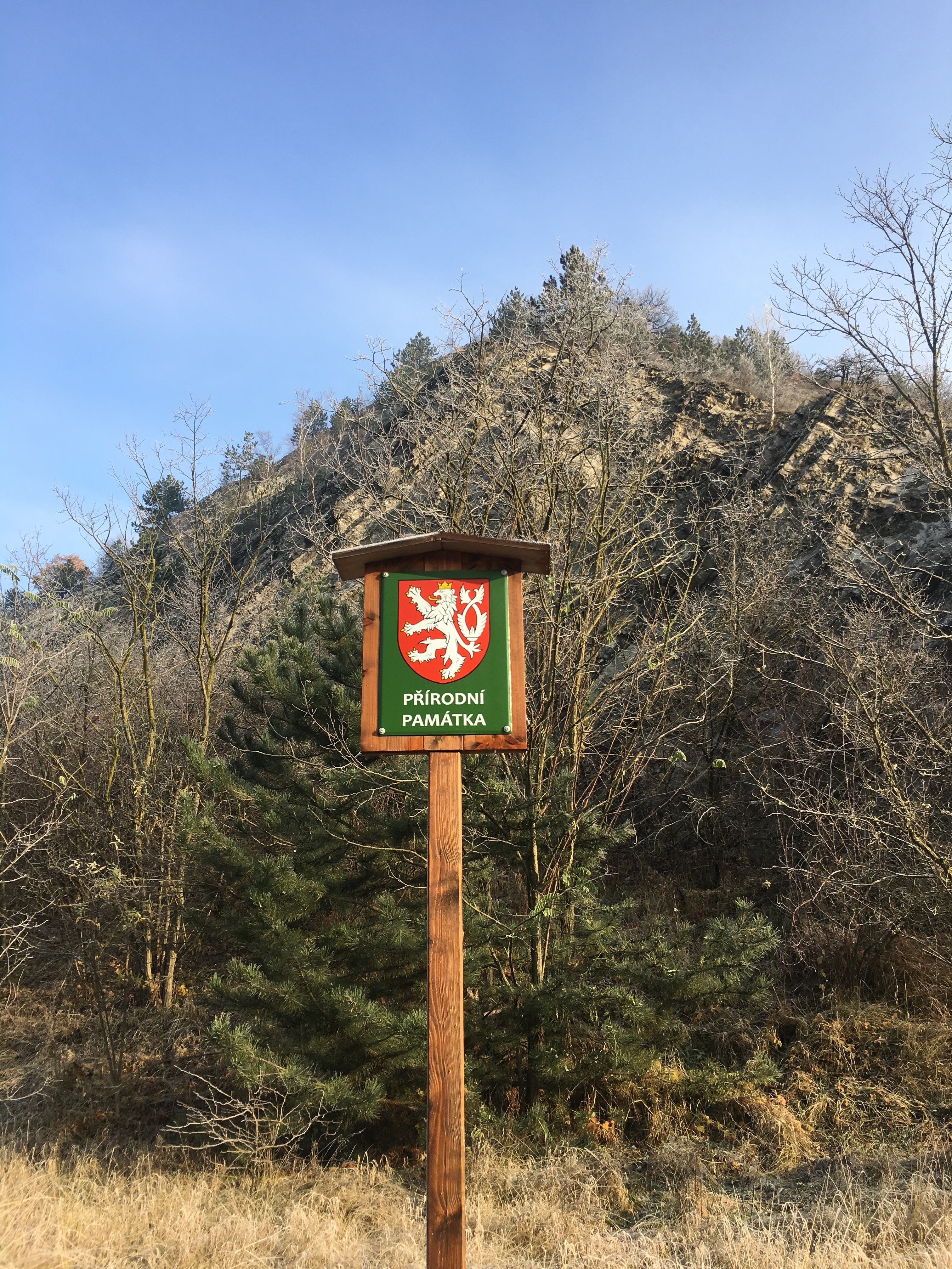 Značka - Přírodní památka